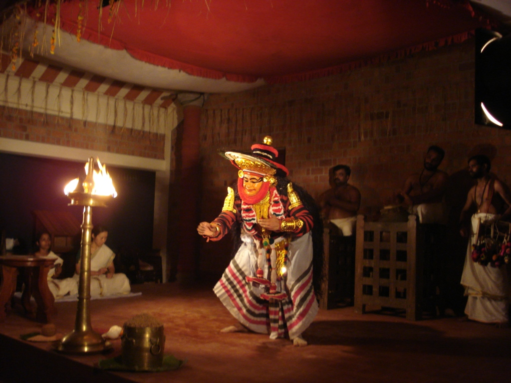 Bhimasena plucking Sougandika flowers